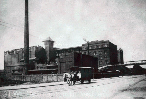 Pferdefuhrwerk an der Kiesekampschen Mühle im Hafenviertel am Albersloher Weg